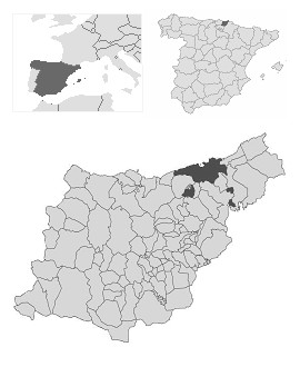 Localización de San Sebastián desde Europa hasta Gipuzkoa, en escala de grises y con nitidez